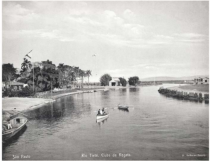 Foto antiga do rio Tietê em São Paulo.